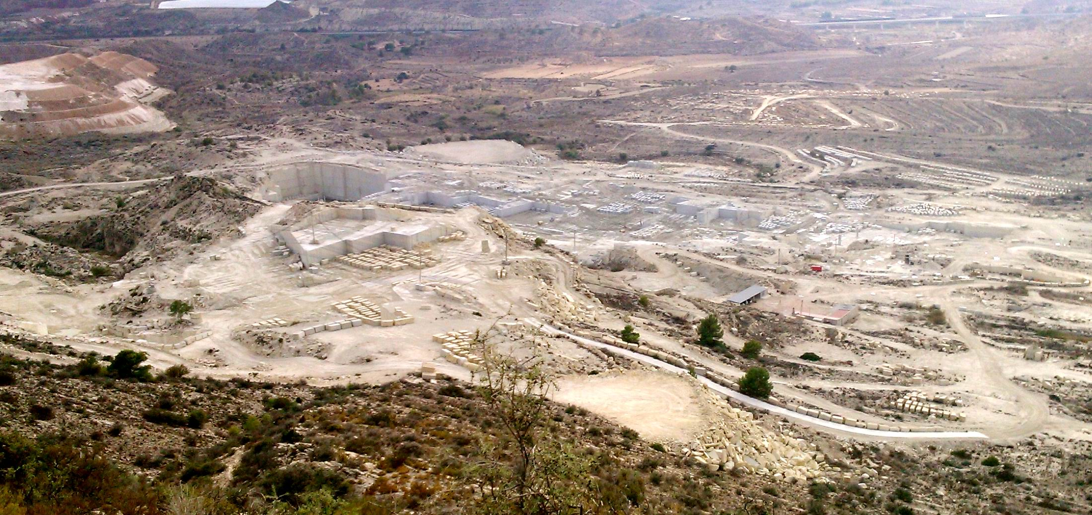 Cantera de piedra natural en Bateig. Elda.